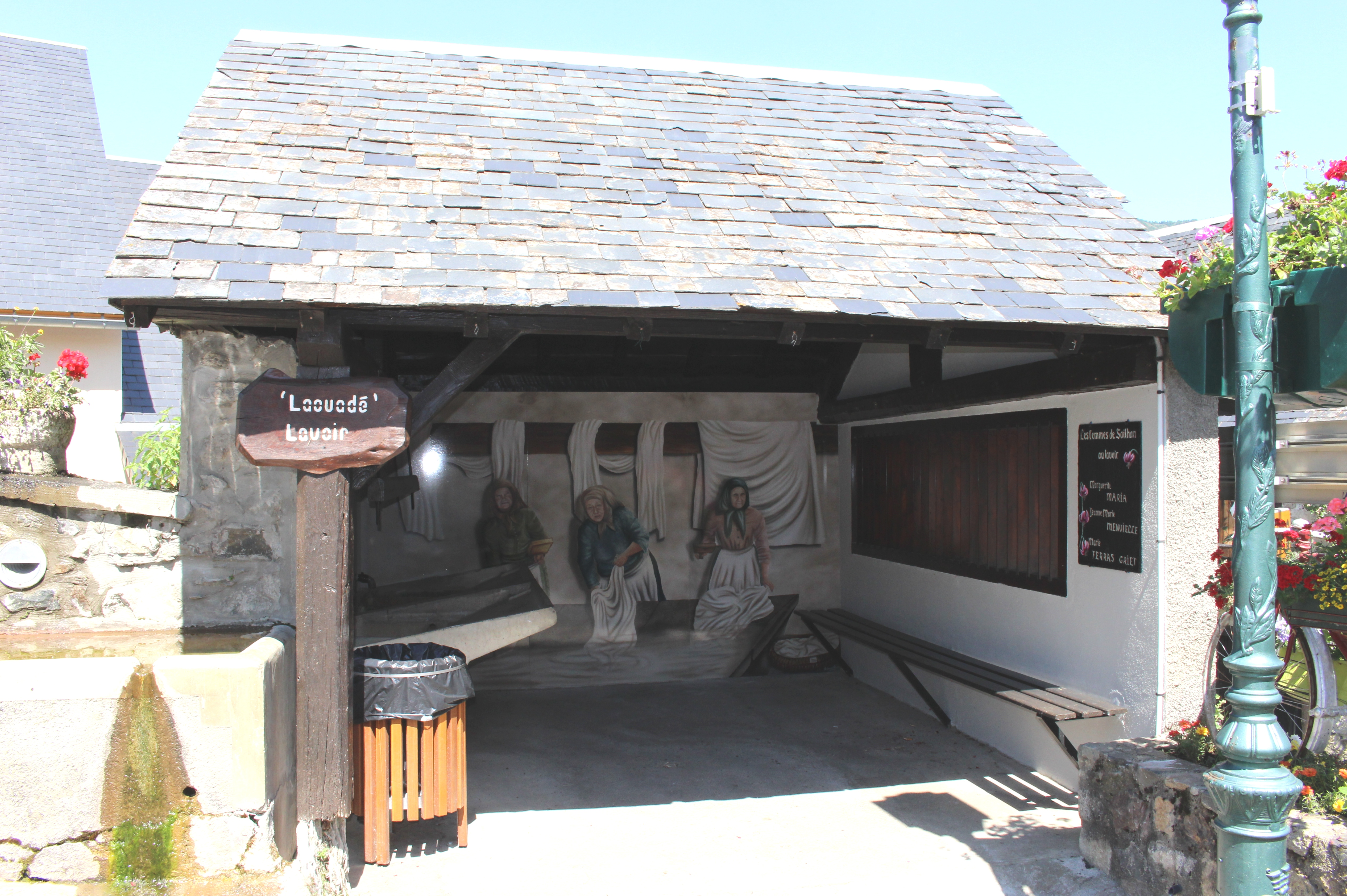 Lavoir de Sailhan (Hautes-Pyrénées)